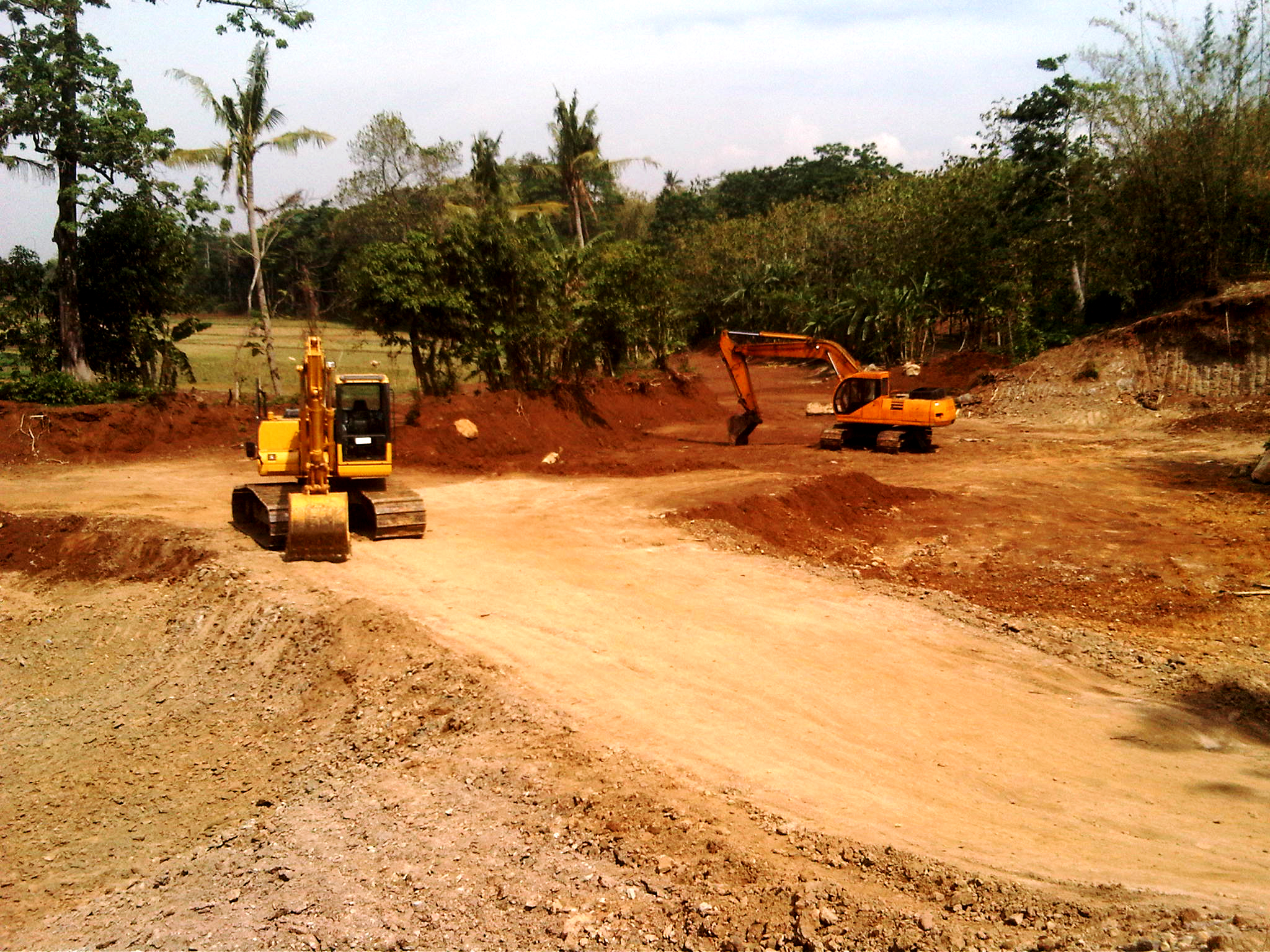 Tanah padas merupakan salah satu dari jenis tanah yang amat padat di karena mineral di dalamnya dikeluarkan oleh air yang terdapat di lapisan tanah sebelah atasnya. Jenis tanah ini terdapat hampir di seluruh wilayah Indonesia. Secara spesifik tanah padas cukup sulit untuk menyerap air, tapi bukanya tidak bisa.kebanyakan tanah padas jarang sekali dimanfaatkan untuk sektor pertanian tapi di gunakan untuk pondasi bangunan besar seperti gedung bertingkat, stadium bola atau pun gudang-gudang besar karena teksur nya yang padat sangat kokoh untuk menopang bangunan besar